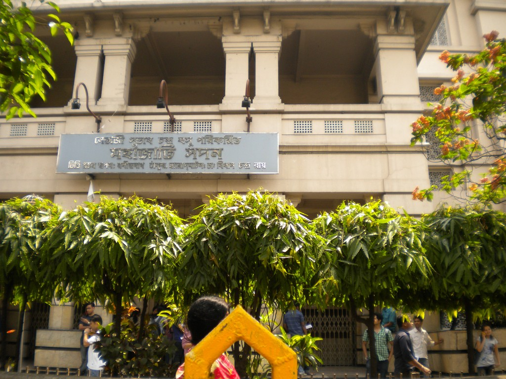 MAHAJATI SADAN KOLKATA